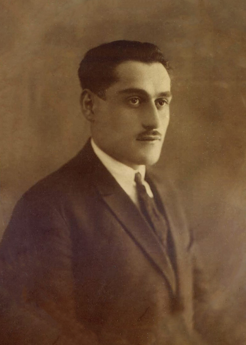 ცნობილი მომღერლის და ლოტბარის, დავით კავსაძის ფოტო